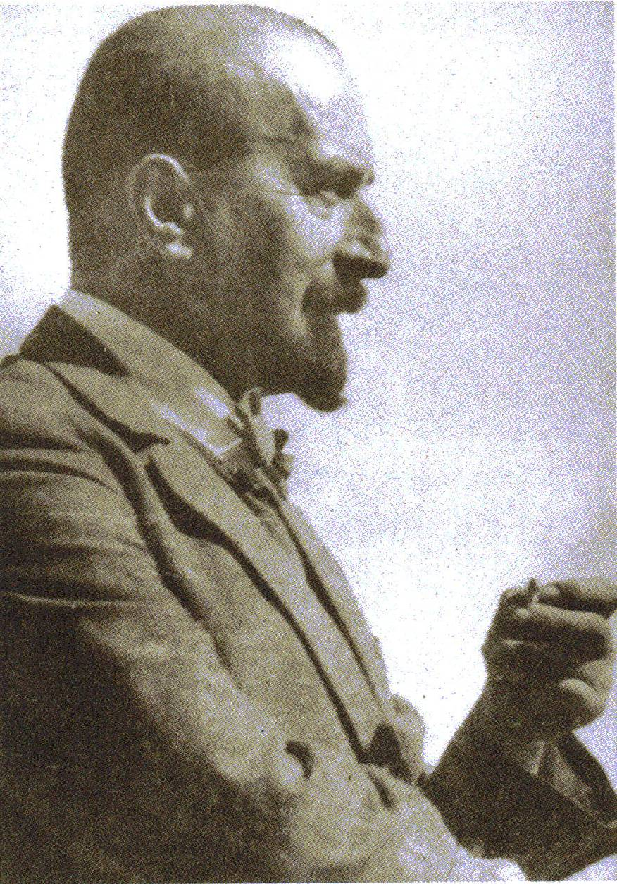 אלכסנדר ברוולד